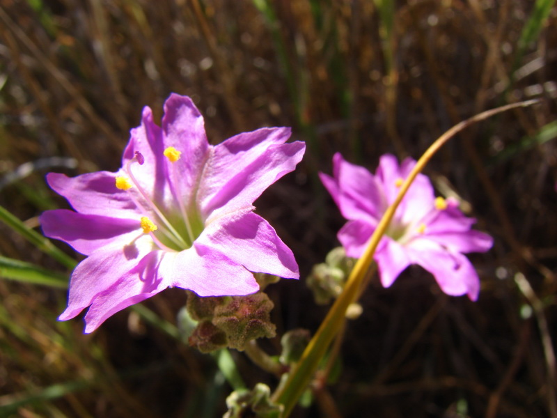 se caracteriza por los estambres exsertos